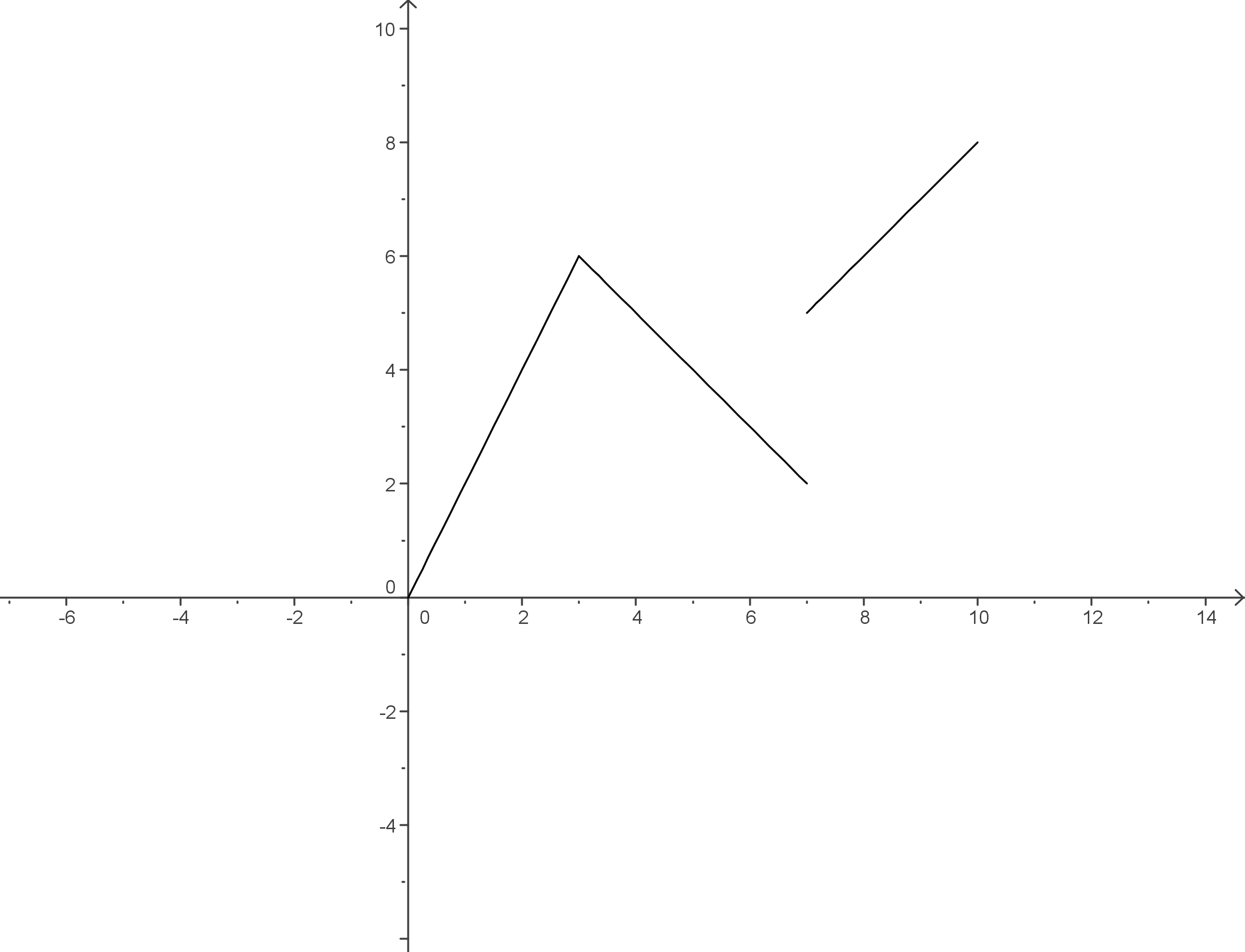 Illustration d'une fonction affine par morceaux. Image personnelle créée avec geogebra.